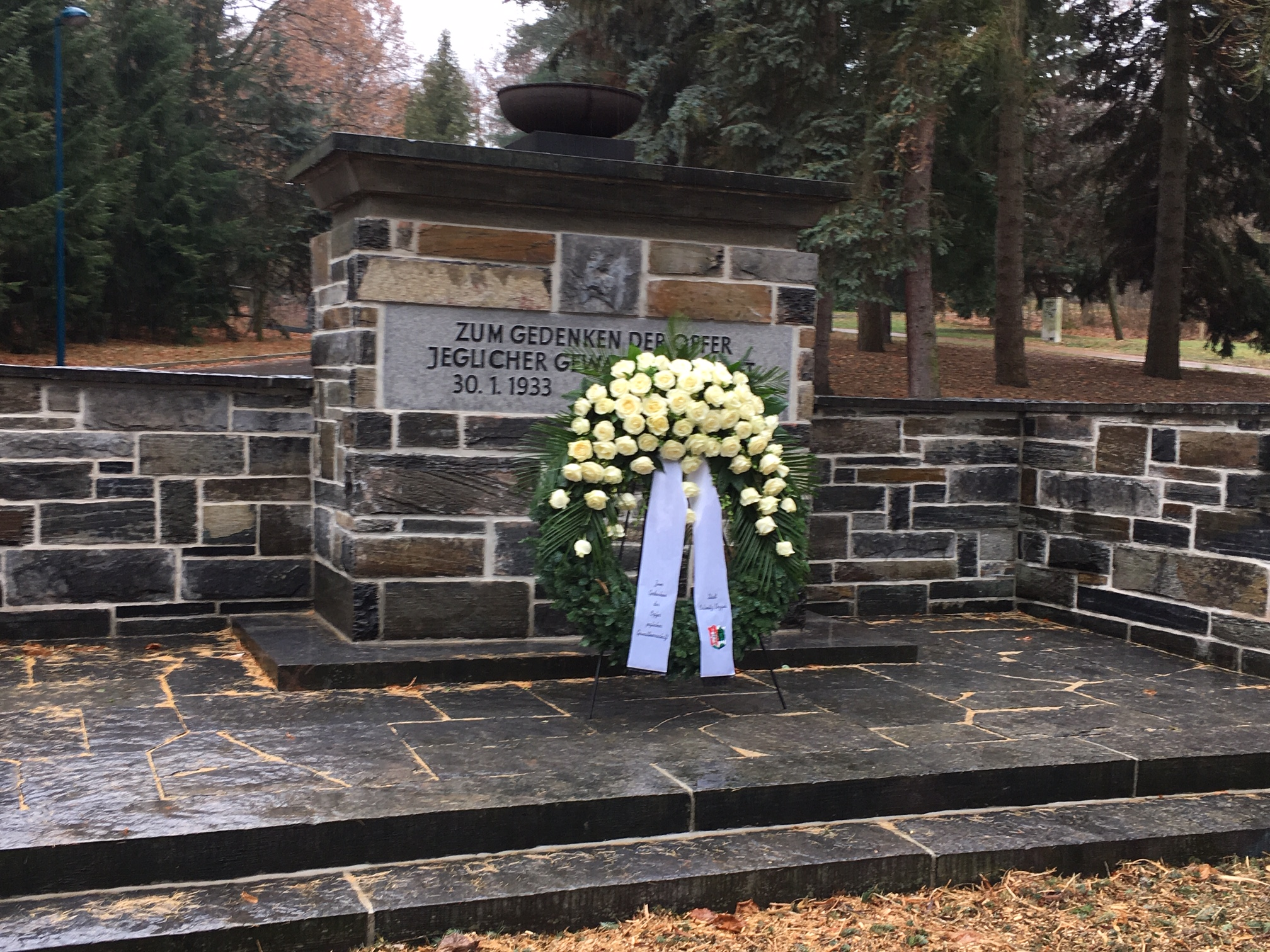 Mahnmal